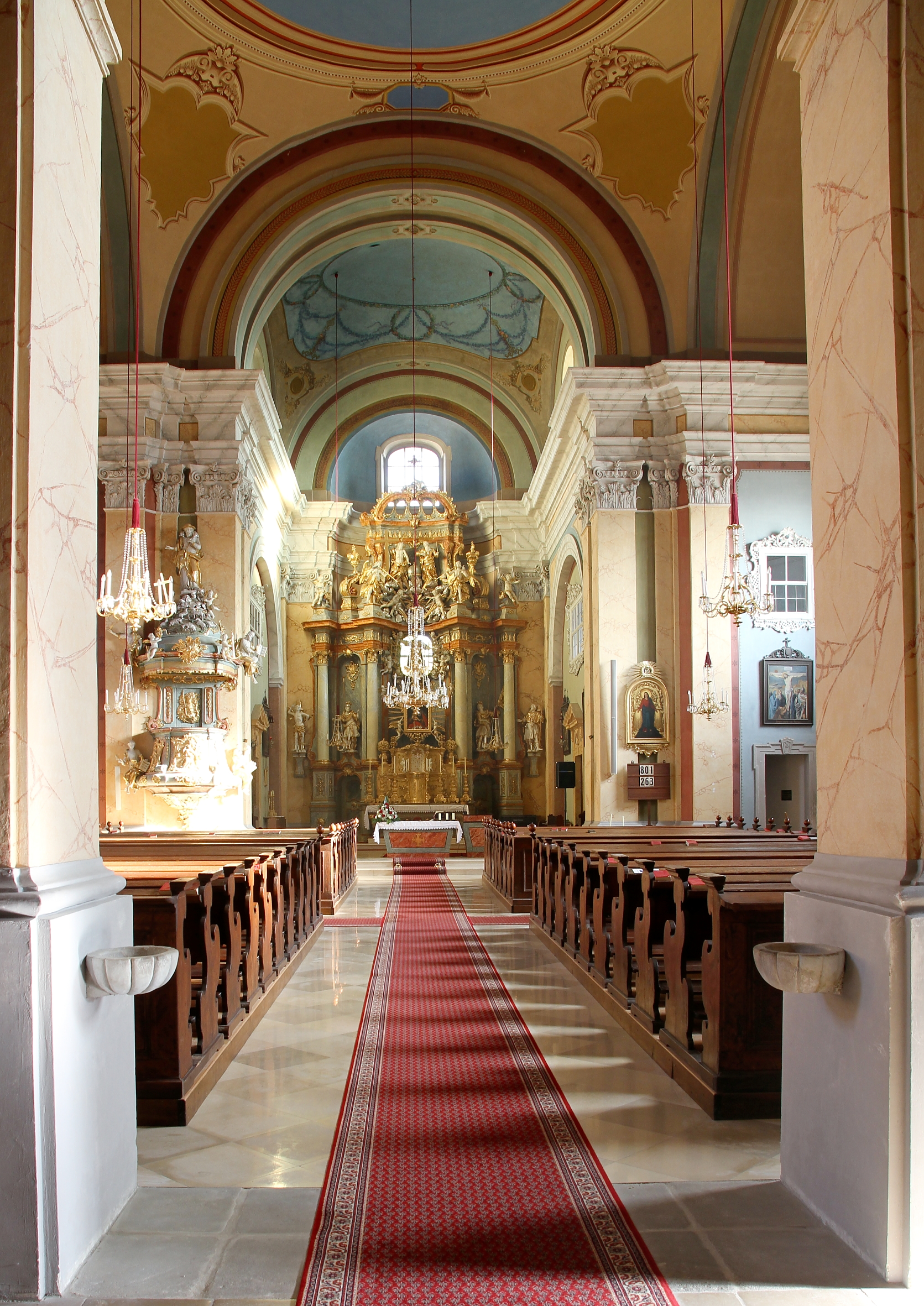 Innenansicht der katholischen Pfarrkirche hl. Laurentius in der niederösterreichischen Gemeinde Niederhollabrunn.